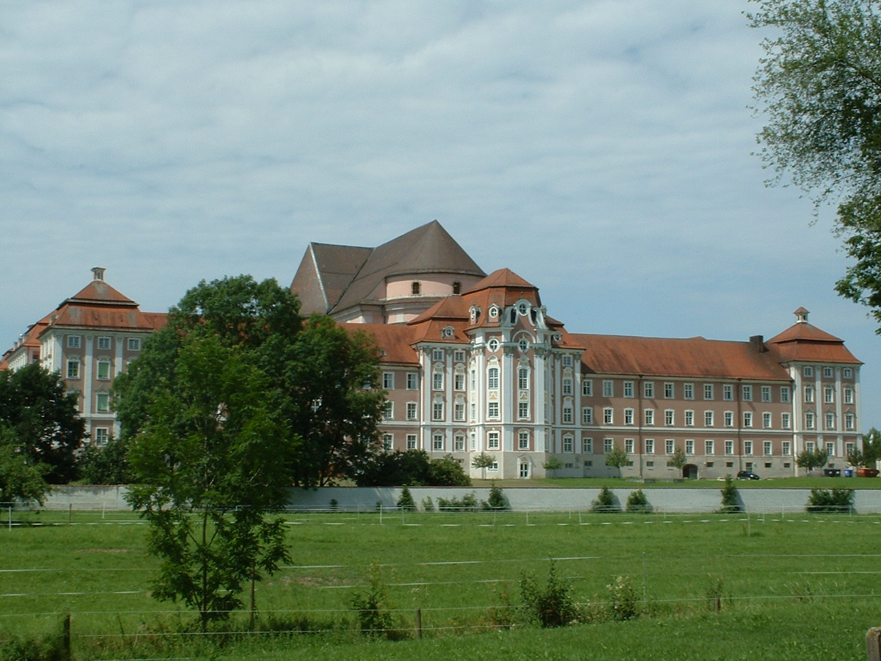 Wiblingen Abbey